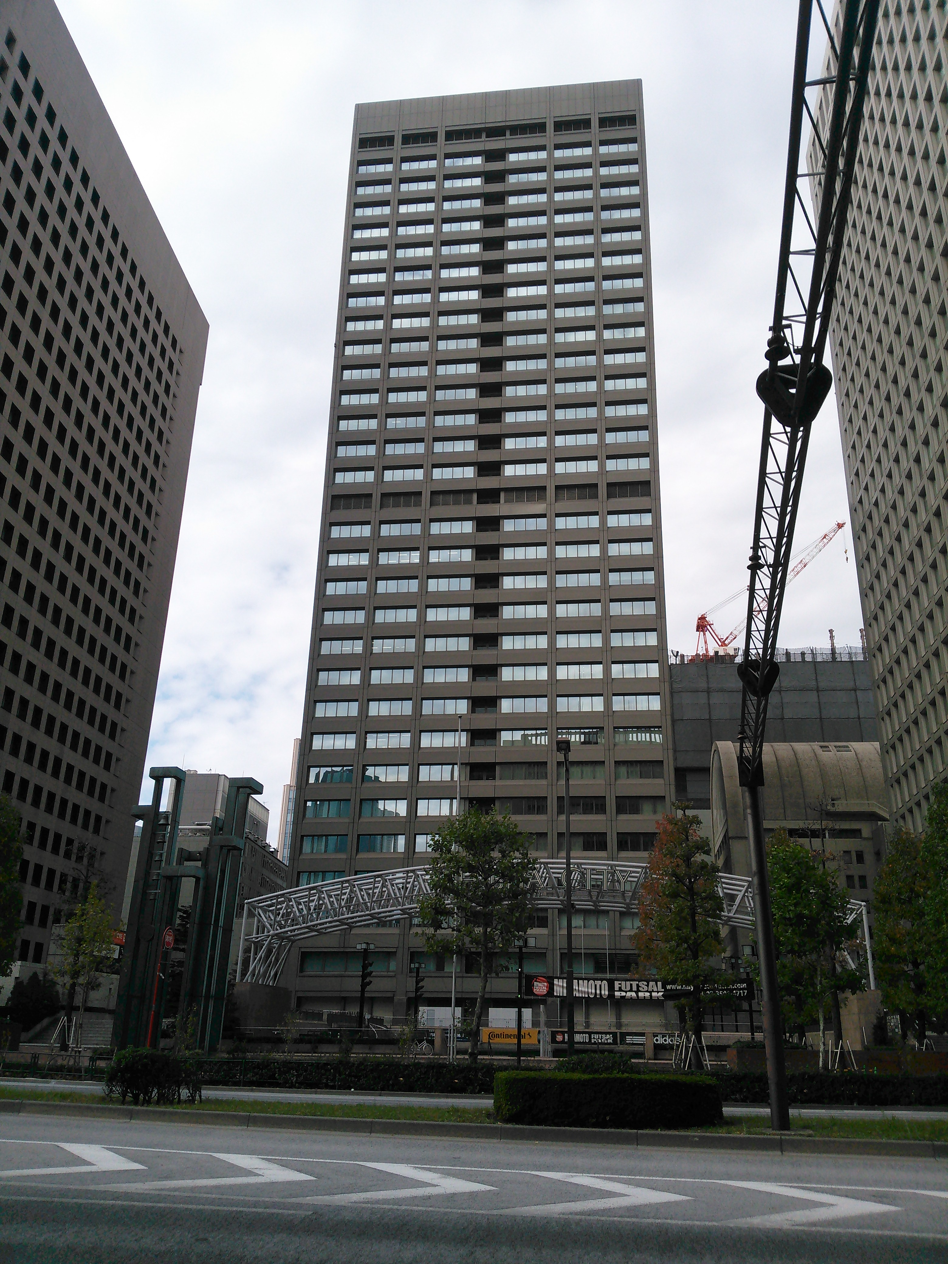 東京都千代田区内幸町、日比谷国際ビルヂング